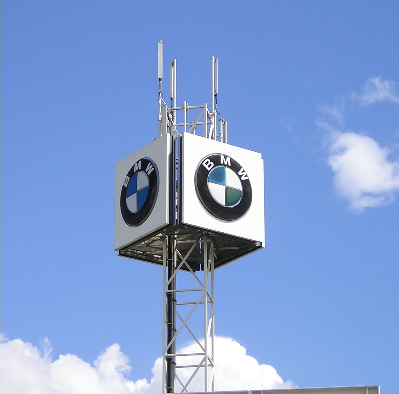 BMW Logo in Düsseldorf Hellerhof: Hans Brandenburg GmbH